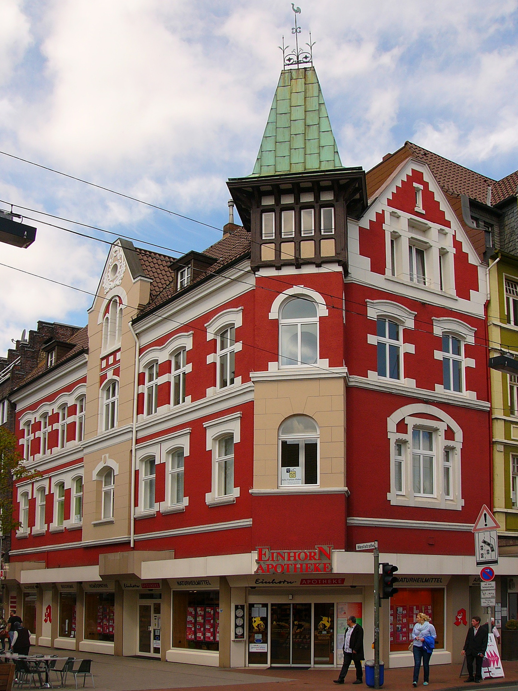 Einhorn-ApothekeThis is a photograph of an architectural monument., no. 233